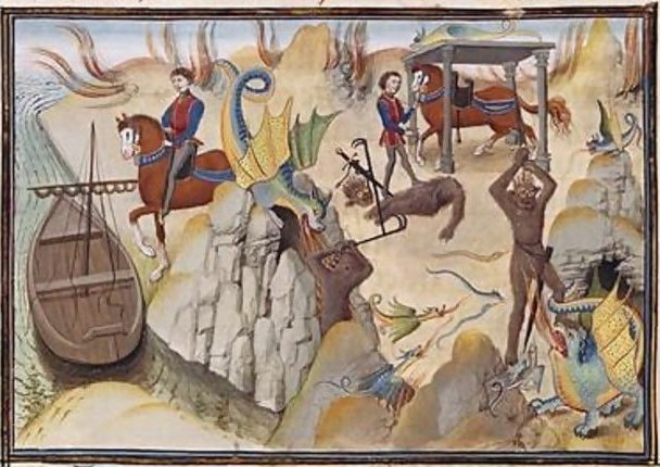 L'enchanteur Maugis s'empare du cheval Bayard. Huile sur toile